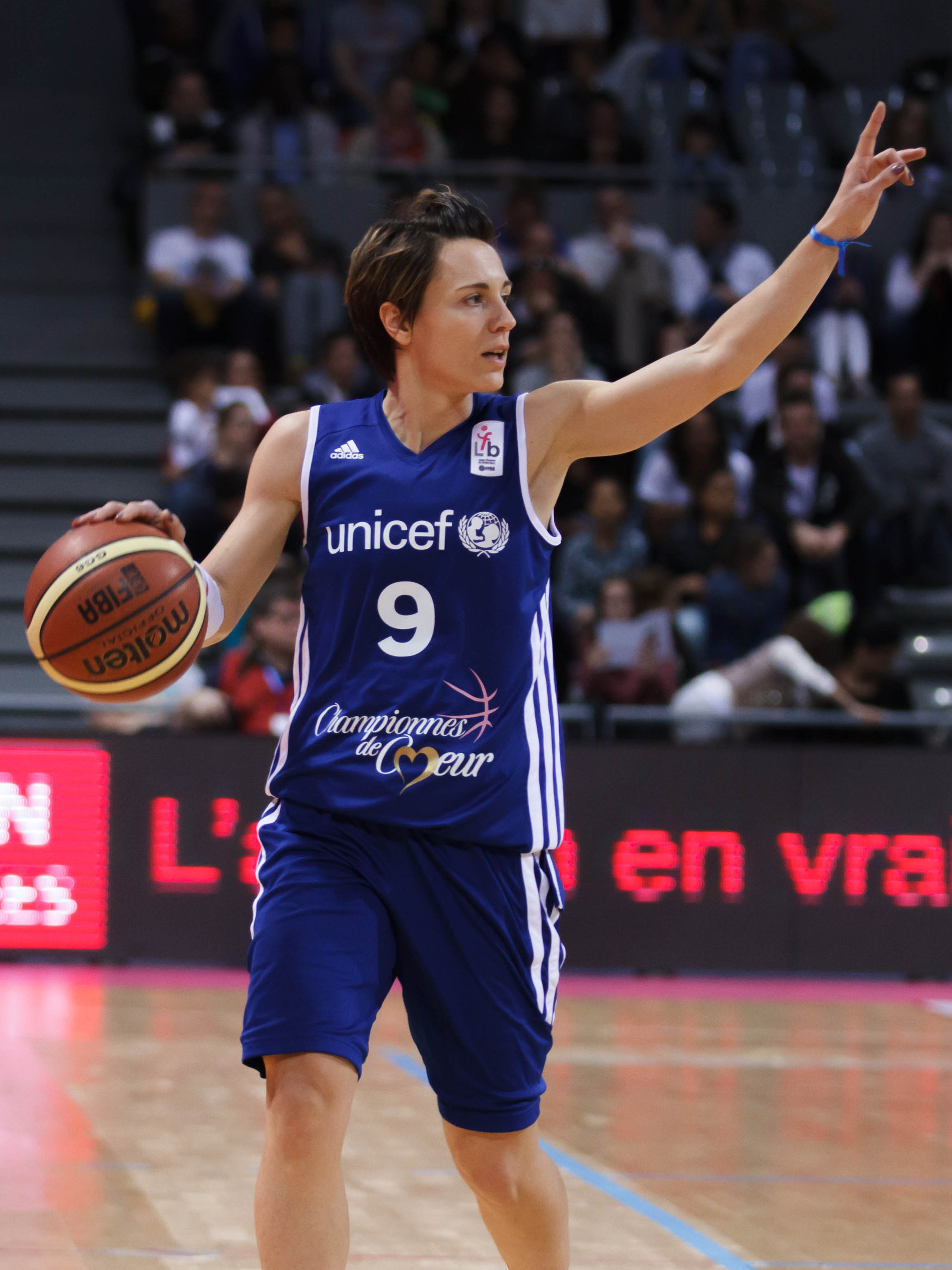 Céline Dumerc, match de gala championnes de cœur